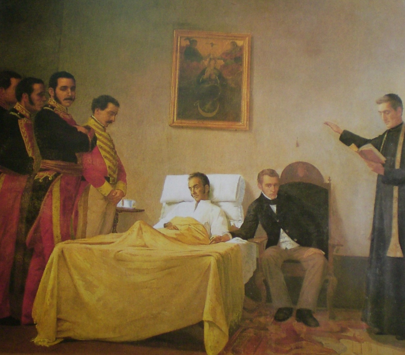 La Muerte del Libertador.